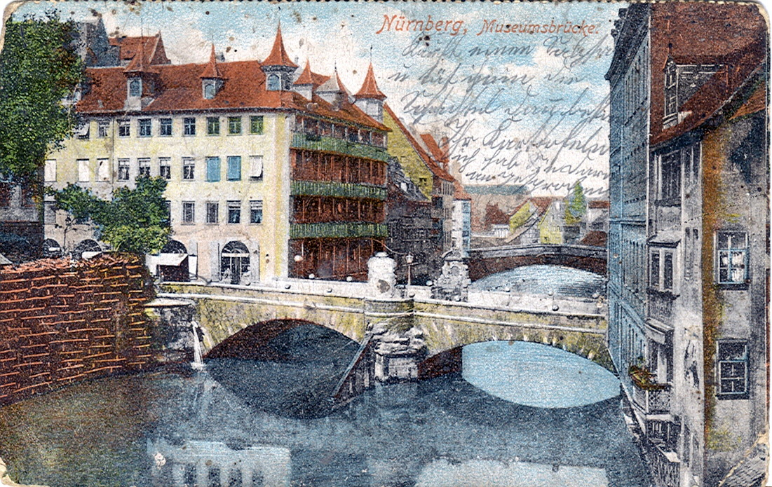 Postkarte, undatiert ( ca. 1914 ). Beschriftung: "Nürnberg - Museumsbrücke".